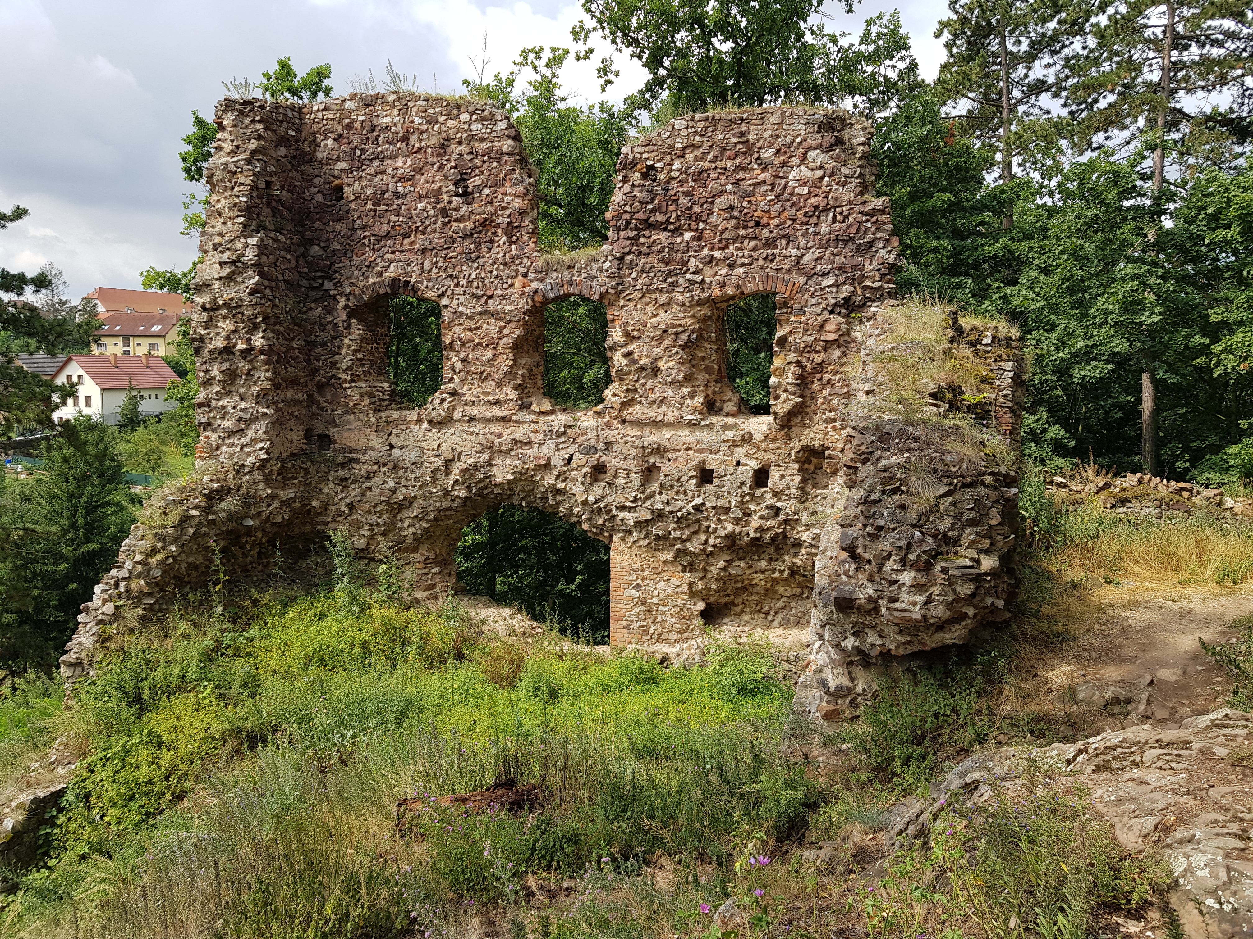 Zřícenina hradu Žebrák, Nový palác